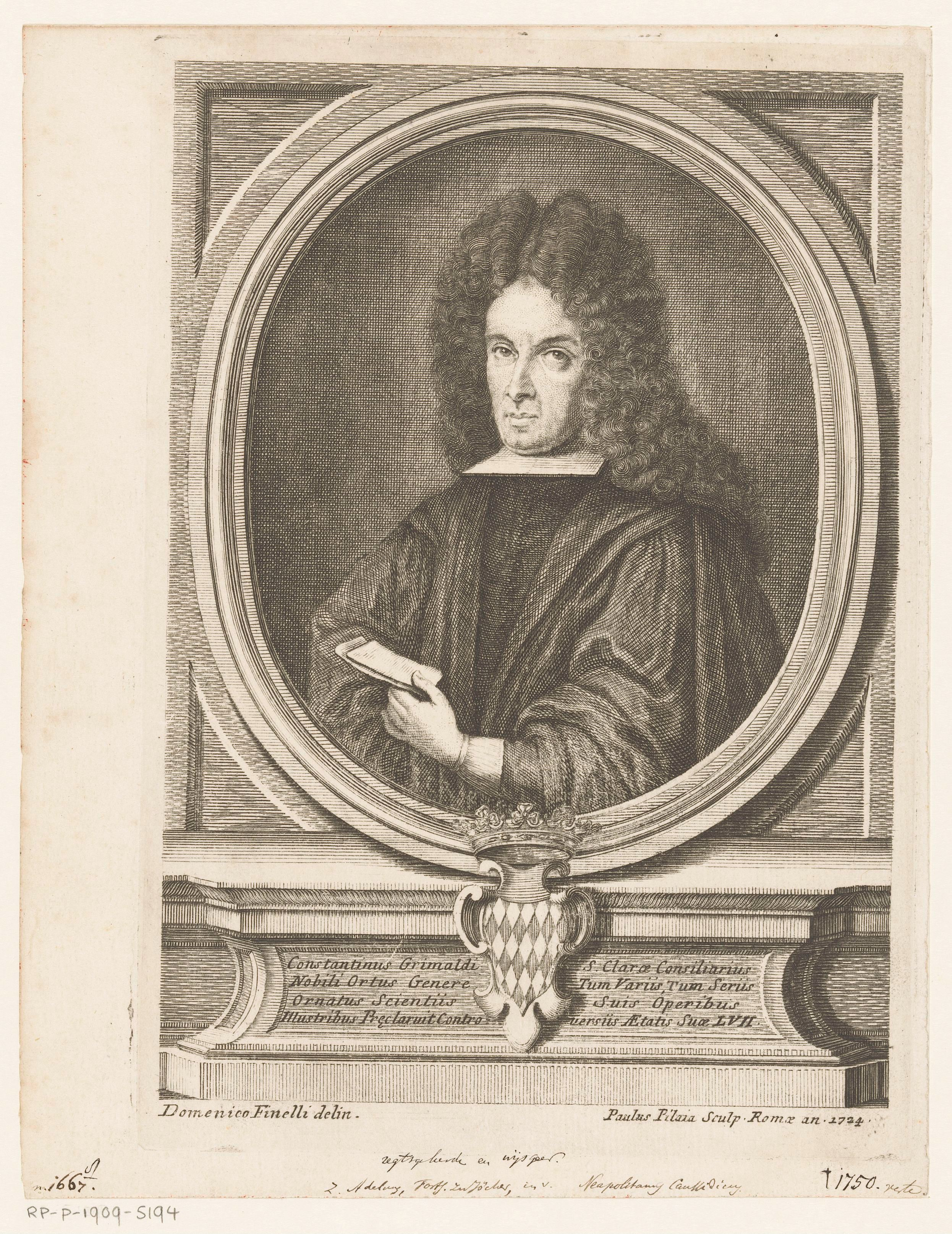 IdentificatieTitel(s): Portret van filosoof en jurist Costantino GrimaldiObjecttype: prent Objectnummer: RP-P-1909-5194Opschriften / Merken: verzamelaarsmerk, verso, gestempeld: Lugt 2228VervaardigingVervaardiger: prentmaker: Paolo Pilaja (vermeld op object)naar tekening van: Domenico Finelli (vermeld op object)Plaats vervaardiging: prentmaker: Romenaar tekening van: ItaliëDatering: 1724Fysieke kenmerken: ets en gravureMateriaal: papier Techniek: graveren (drukprocedé) / etsenAfmetingen: plaatrand: h 233 mm × b 162 mmOnderwerpWat: historical personsscholar, philosopherWie: Costantino GrimaldiVerwerving en rechtenVerwerving: aankoop 1905Copyright: Publiek domein